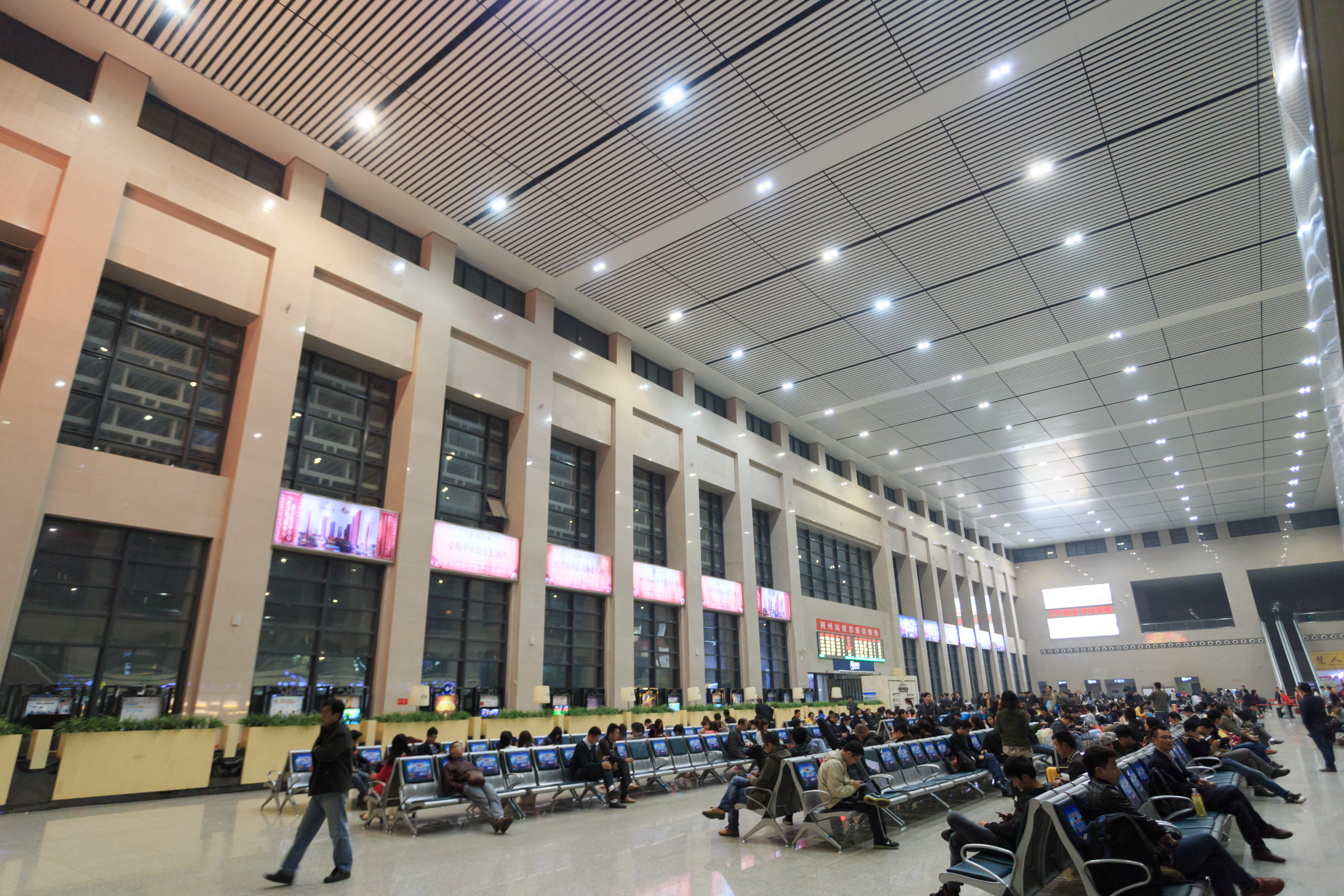 荆州站候车厅